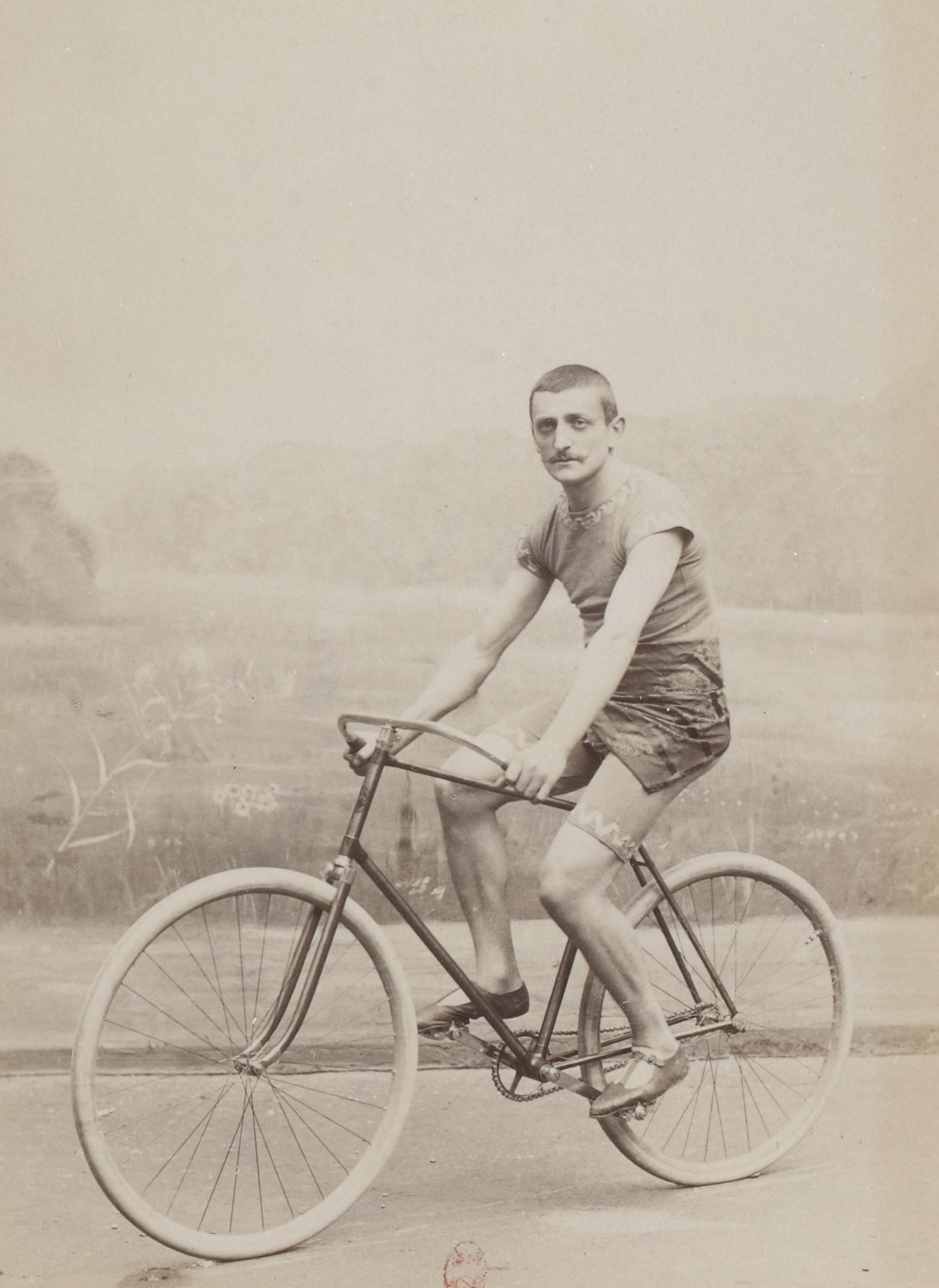 [Collection Jules Beau. Photographie sportive] : T. 6. Année 1898 / Jules Beau : F. 46v. Corre ; Cottereau